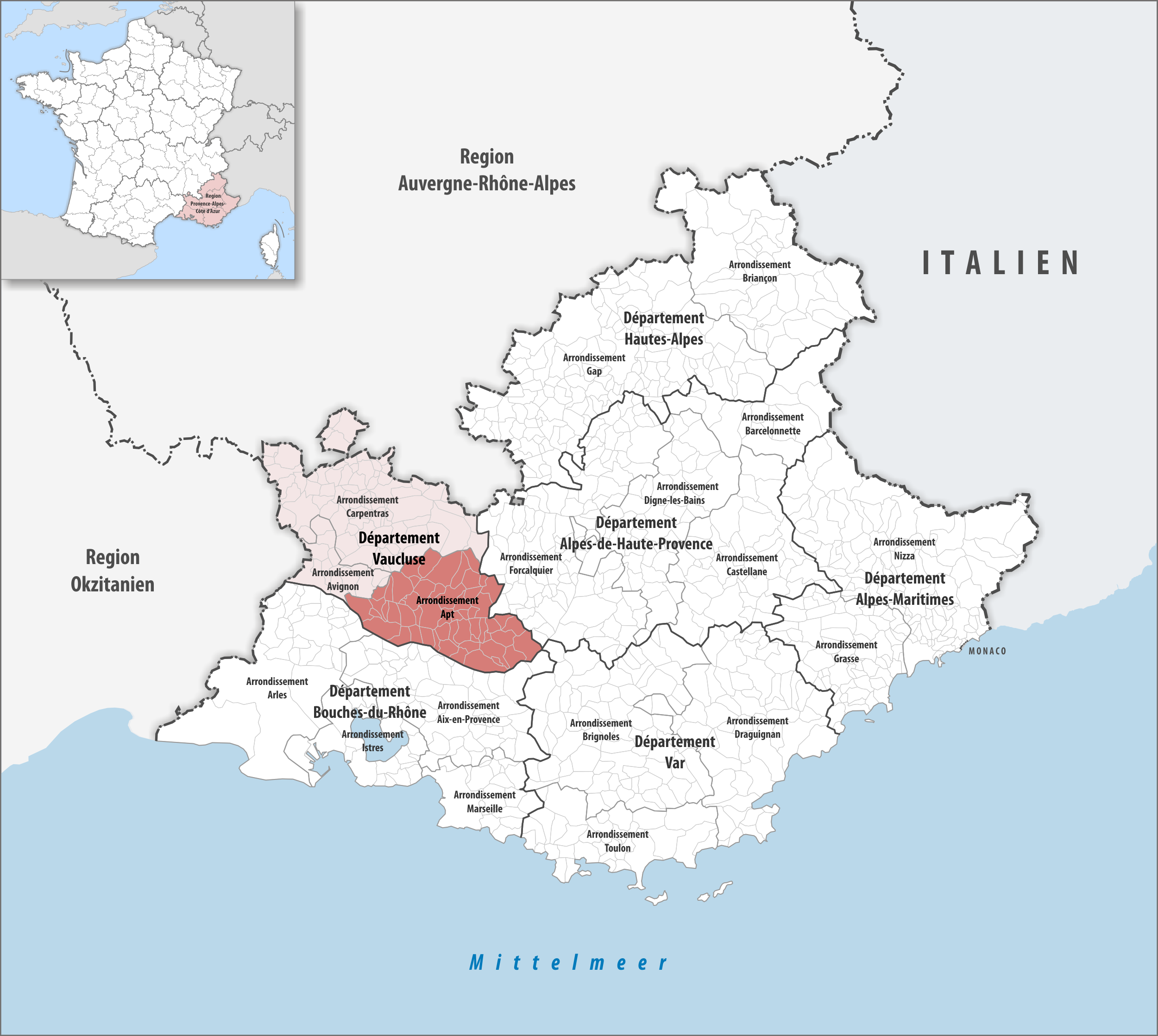 Lage des Arrondissements Apt